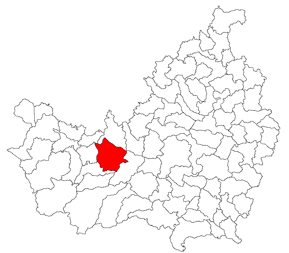 Categorie:Hărţi ale judeţului Cluj